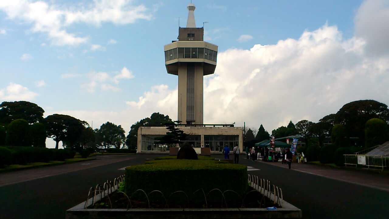 鹿児島県霧島市にある城山公園。